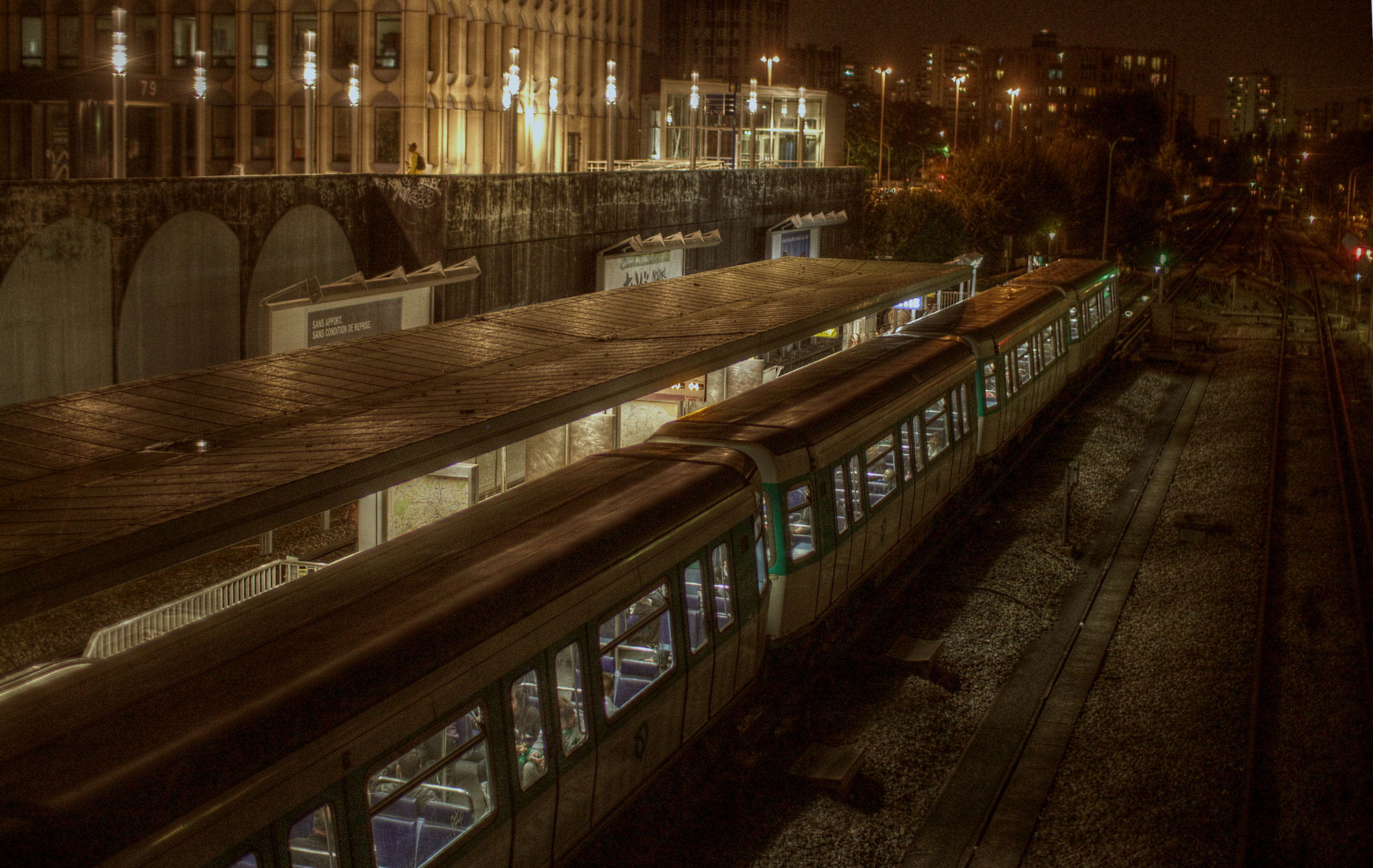 La station de Créteil-l'Échat sur la ligne 8. Septembre 2012